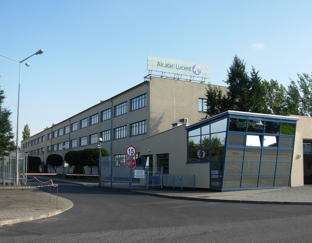 Przedsiębiorstwo Alcatel-Lucent w Bydgoszczy